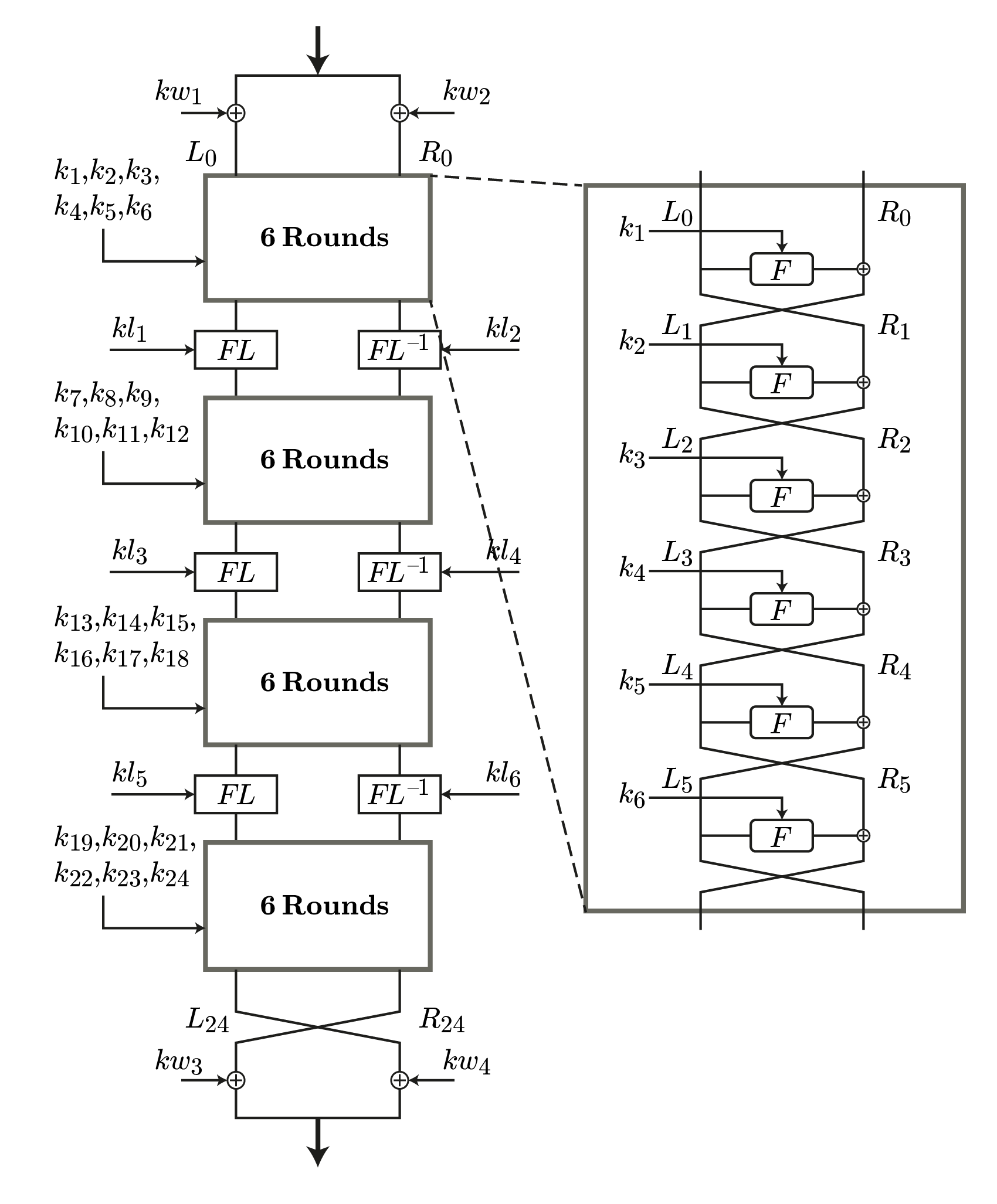 תרשים רשת פייסטל של צופן קמליה עם מפתח 192/256 סיביות